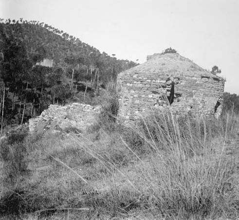 Imatge